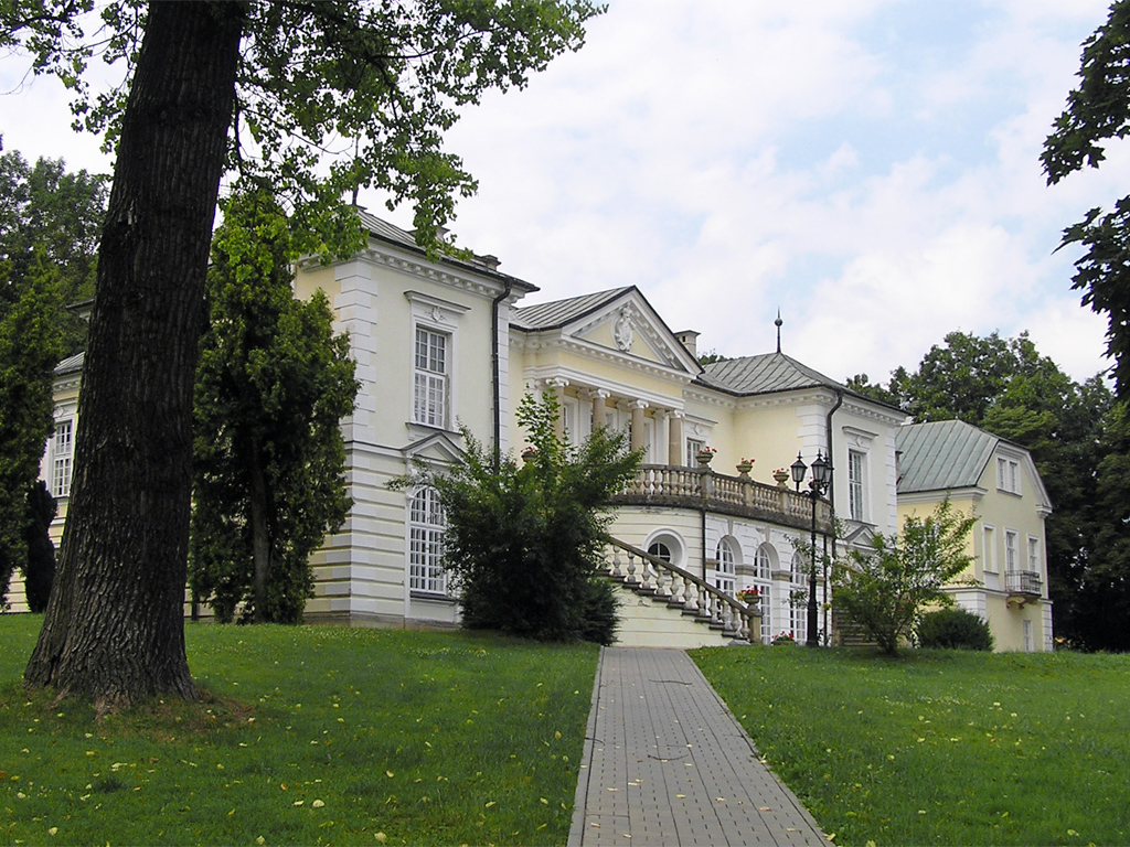 Balice - Pałac Radziwiłłów (zabytek nr A-655/M)